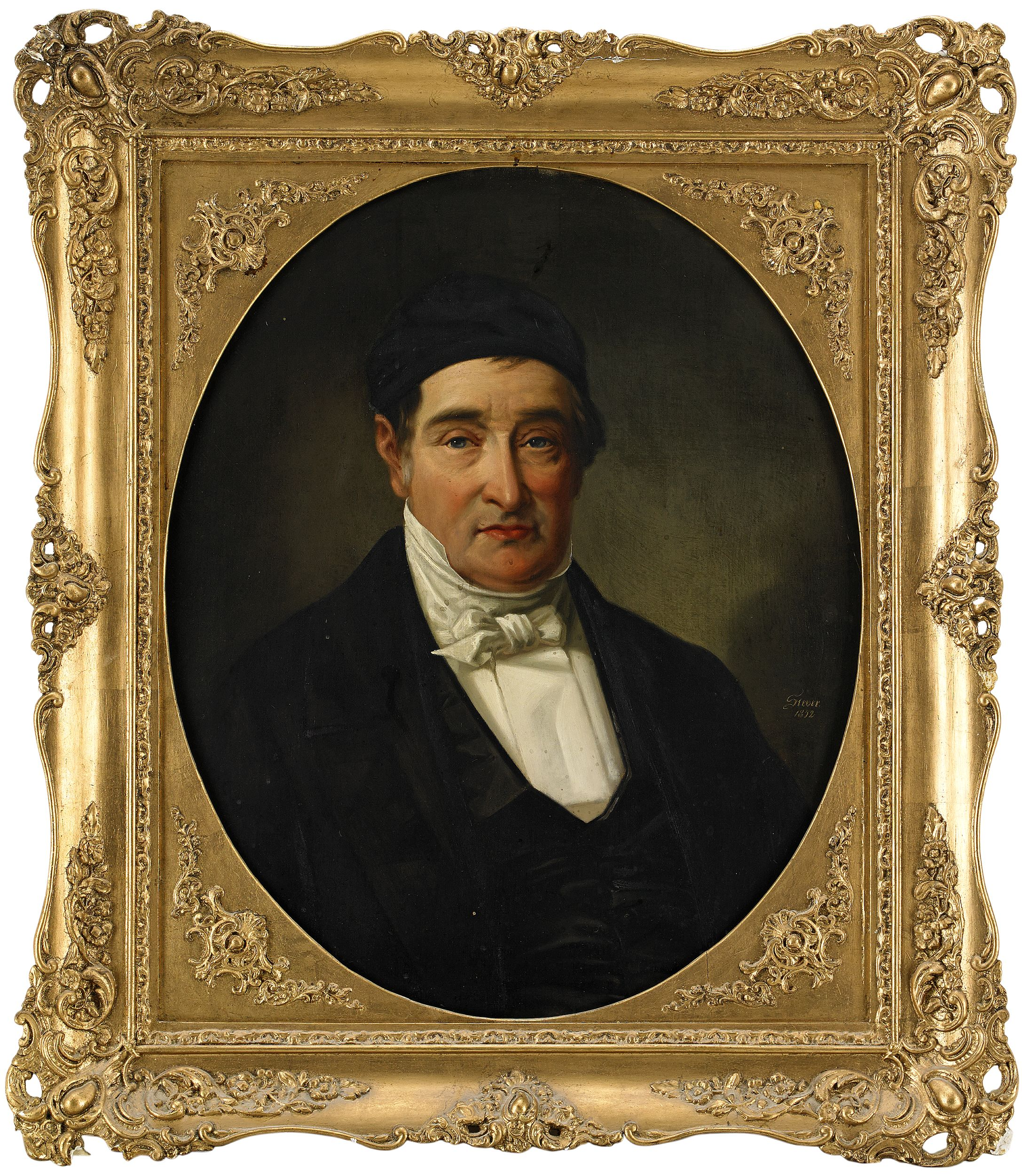 Grosshandlaren Aaron Levy Lamm, avporträtterad av Gustav Curt Stever. Signerad och daterad Stever 52.